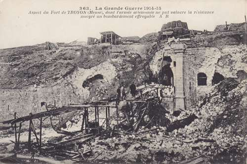 Carte postale - Fort de Troyon (2)